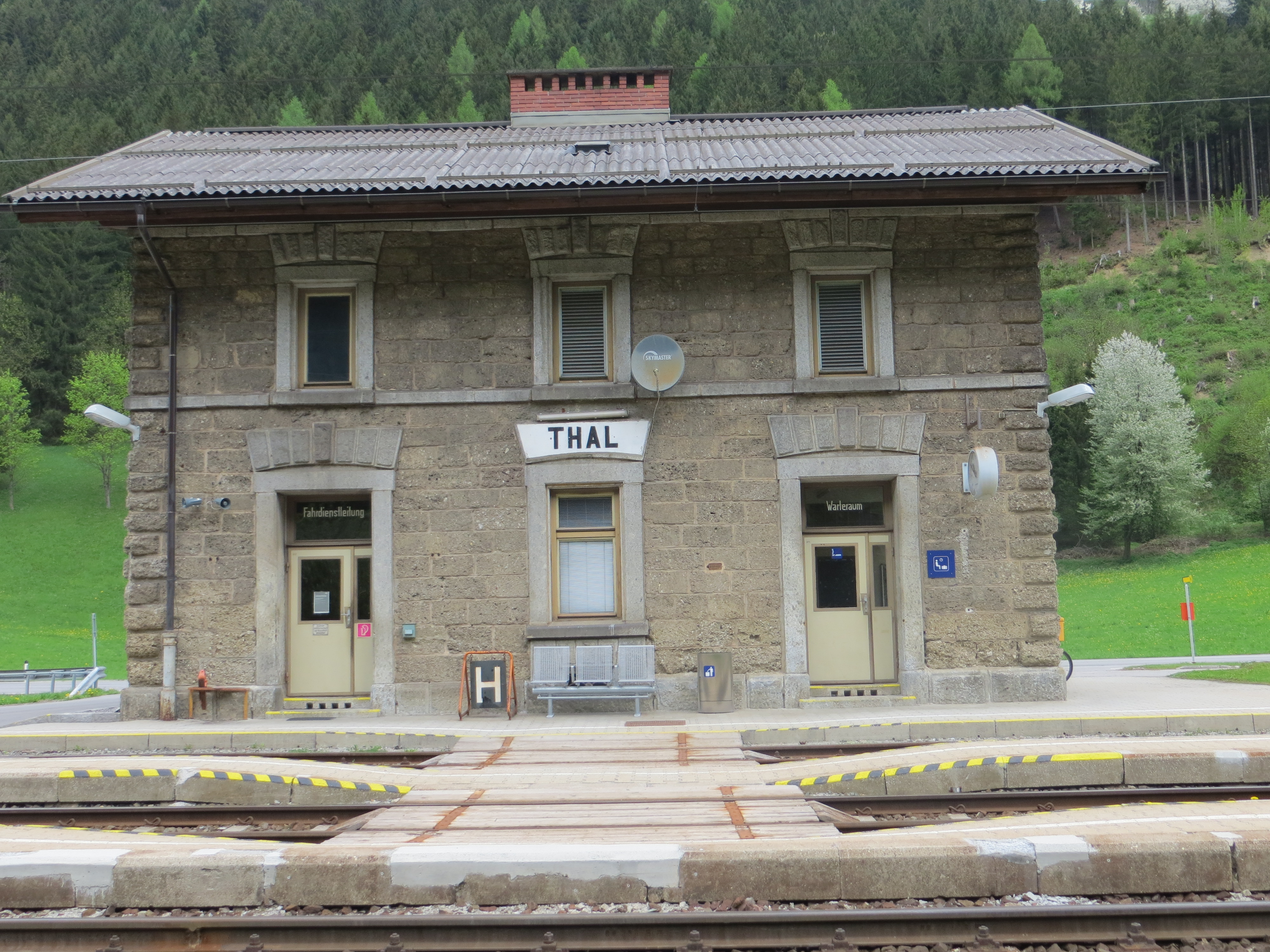 Aufnahmsgebäude, Bahnhof Thal